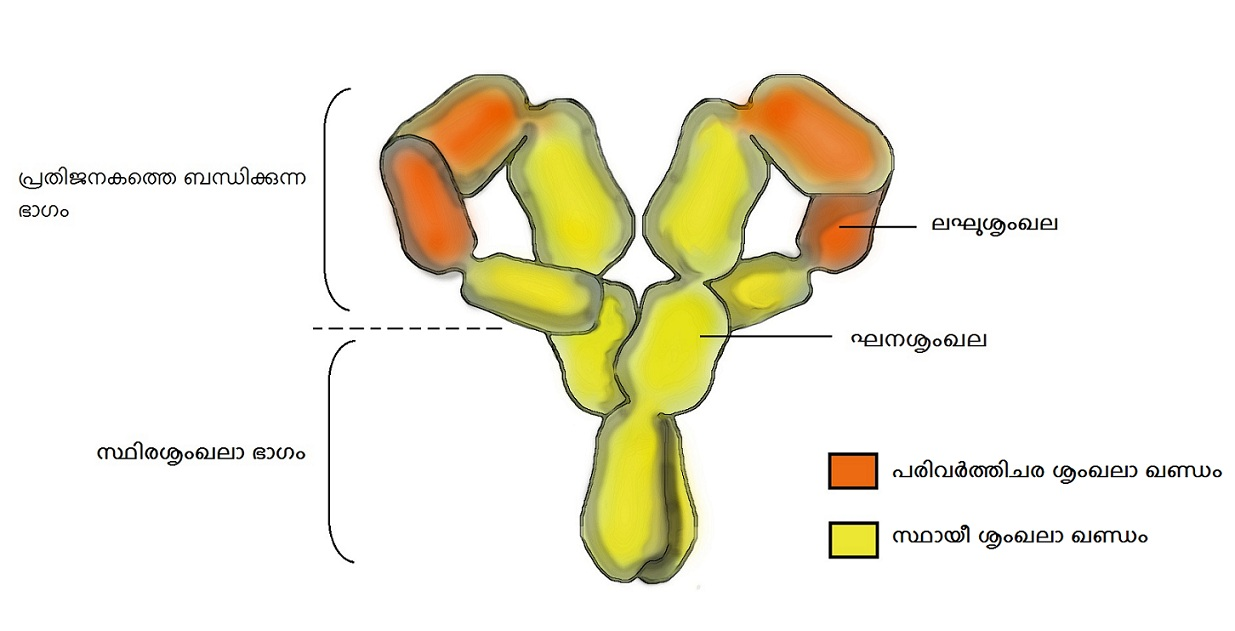 ഇമ്മ്യൂണോഗ്ലോബുലിൻ ത്രിമാന ഘടന